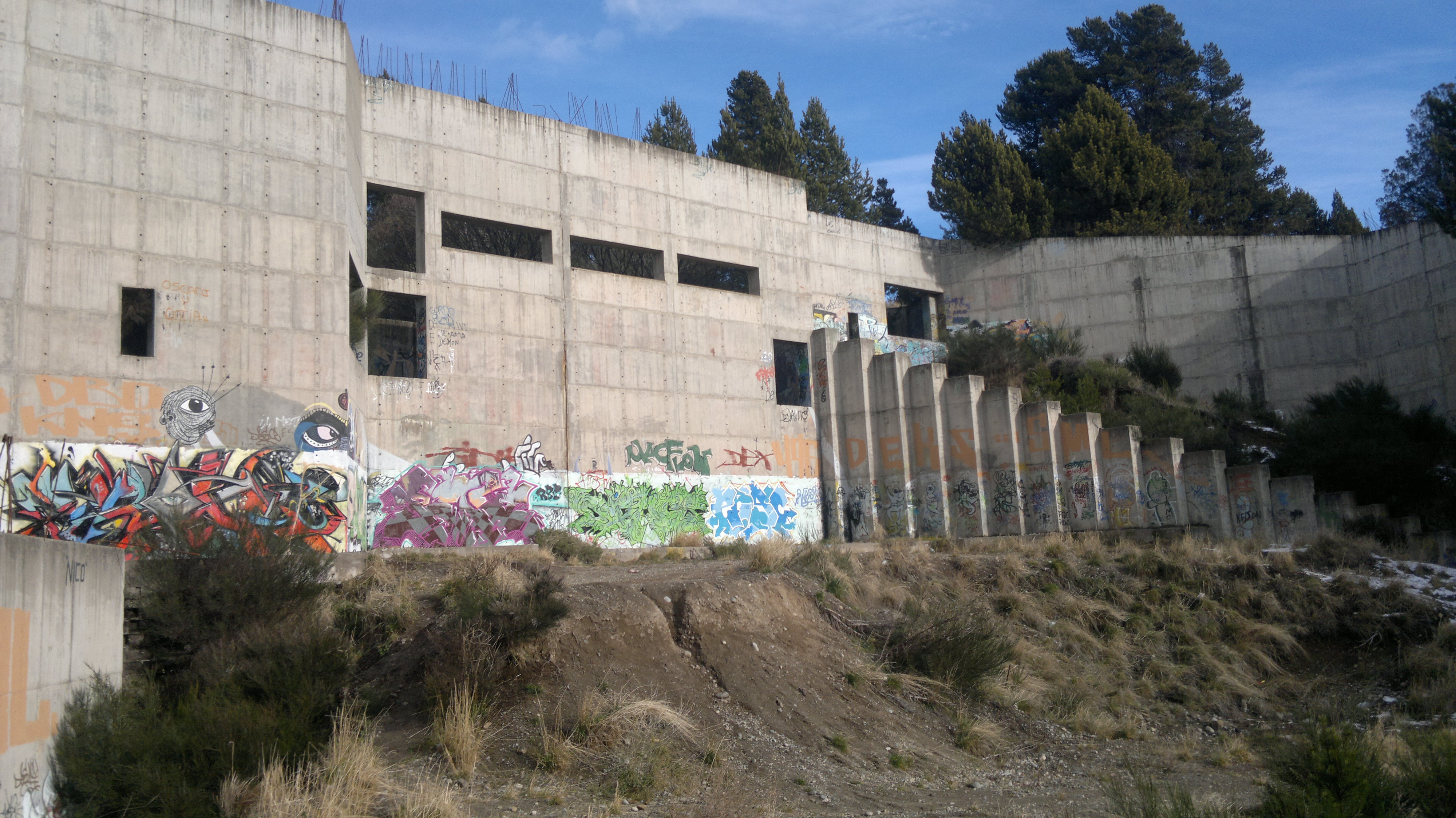 Interior de la nave principal en 2014.